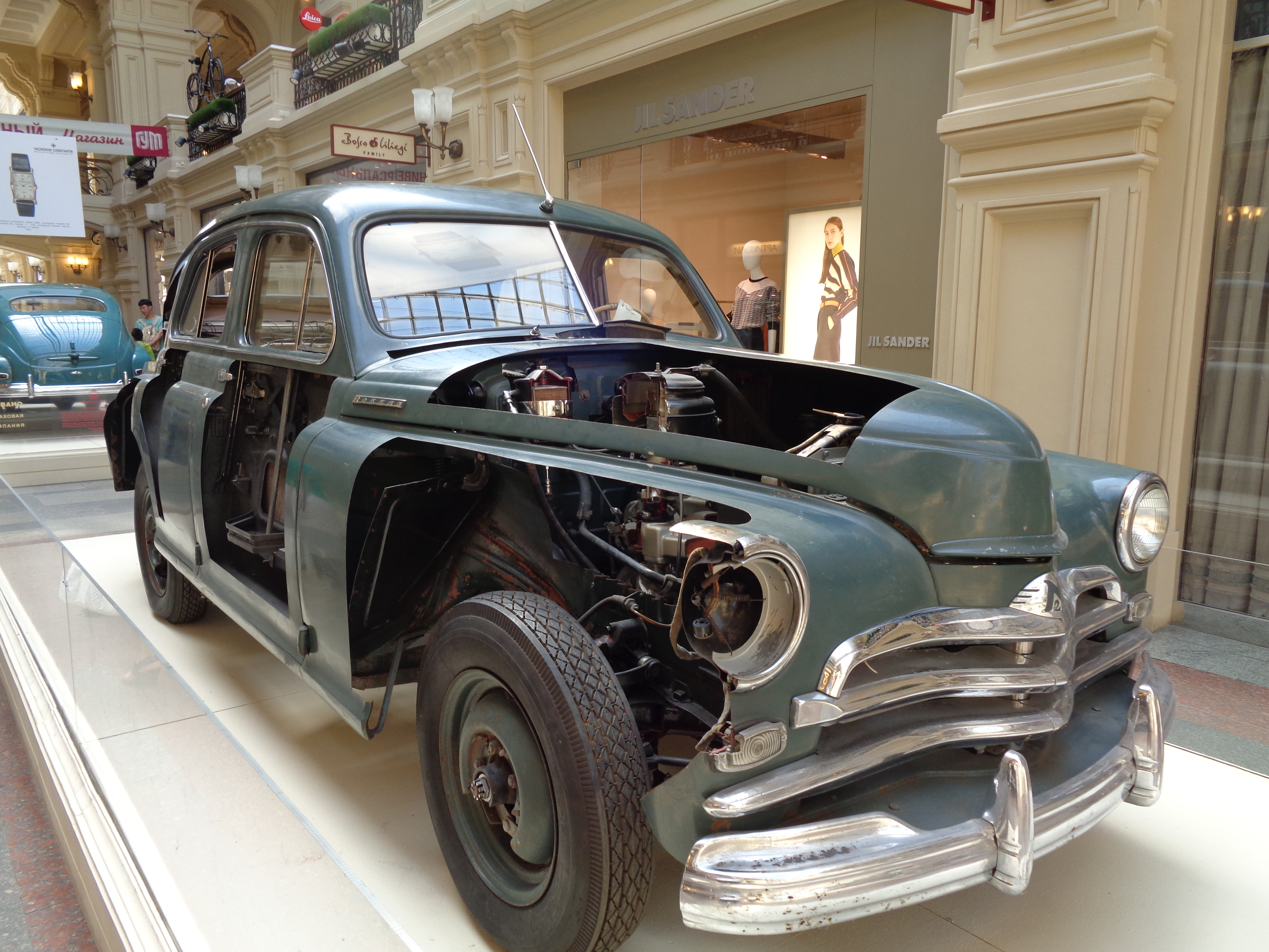 Макет ГАЗ-М20 на временной выставке в ГУМе, 2015